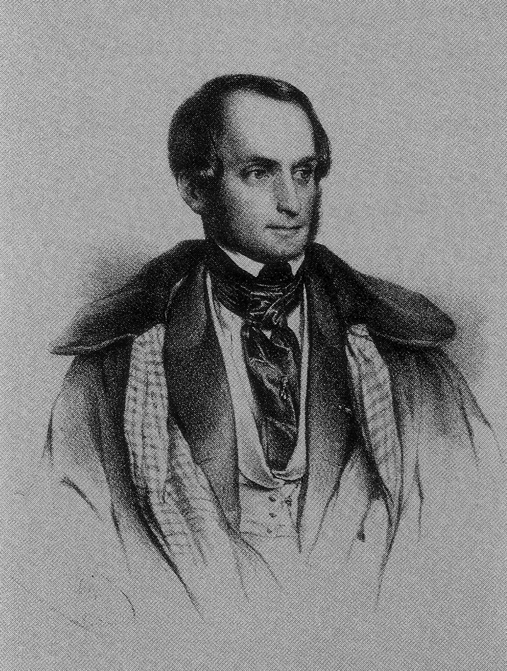 Sebastian Franz von Daxenberger (1809-1878), Abgeordneter der Paulskirchenversammlung